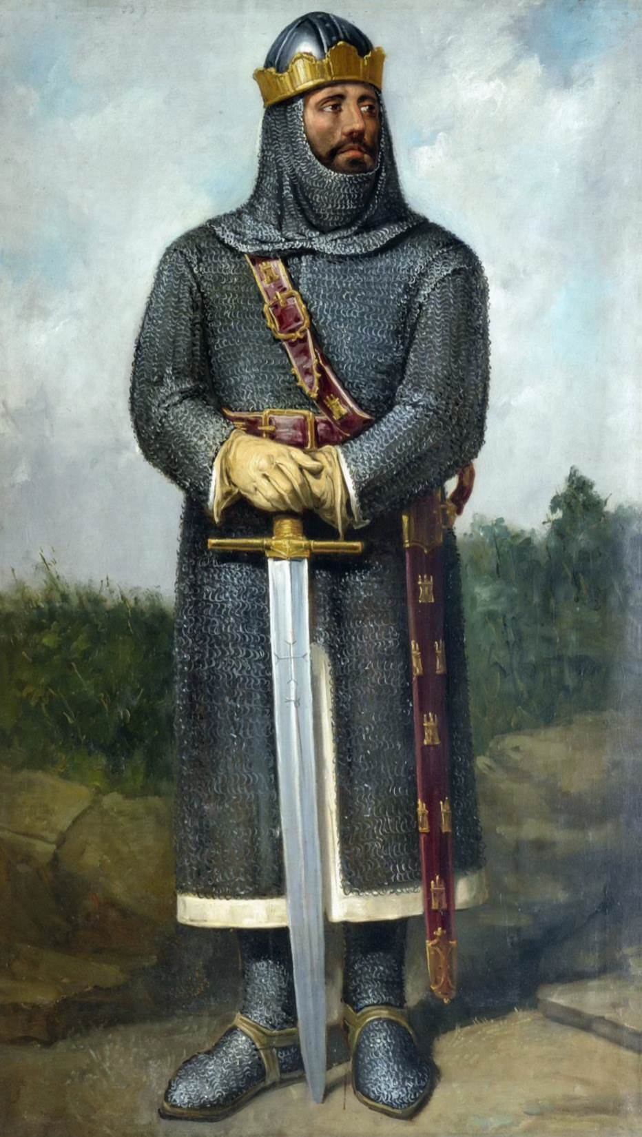 Retrato imaginario del rey Alfonso VII de León (1105-1157). Fue hijo de la reina Urraca I de León y del conde Raimundo de Borgoña. Fue el primer rey de la Casa Real de Borgoña leonesa y el día 26 de mayo de 1135 fue coronado Imperator totius Hispaniae (Emperador de España) en la catedral de León, recibiendo homenaje, entre otros, de su cuñado Ramón Berenguer IV, conde de Barcelona. Falleció en 1157, a los 51 años de edad y a su muerte, el reino de León fue heredado por su hijo, Fernando II de León, y el reino de Castilla fue heredado por su hijo primogénito, Sancho III de Castilla.